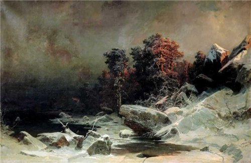 Мещерский, Арсений Иванович (1834 - 1902) Зимний вечер в Финляндии